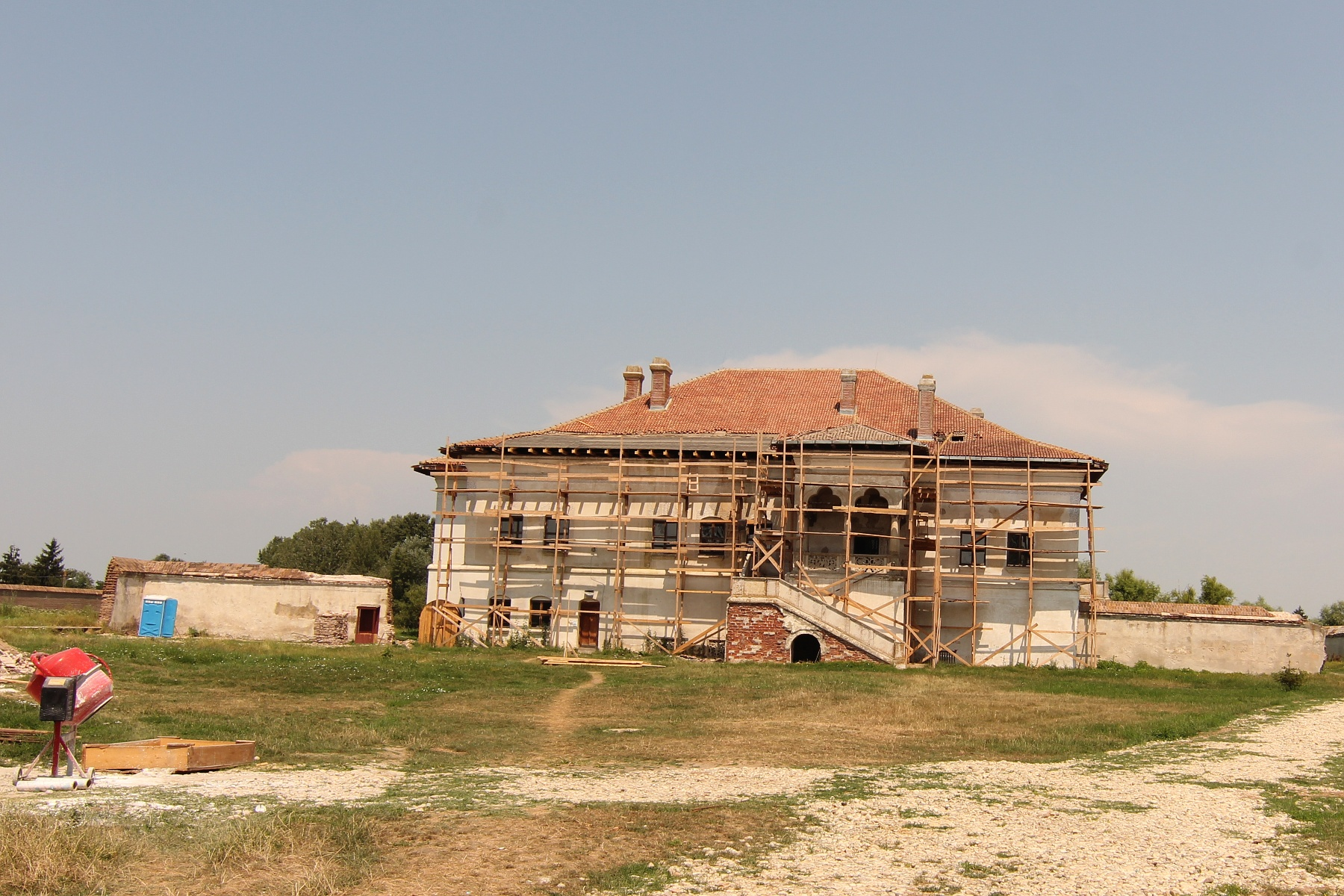 Palatul Brâncovenesc 03